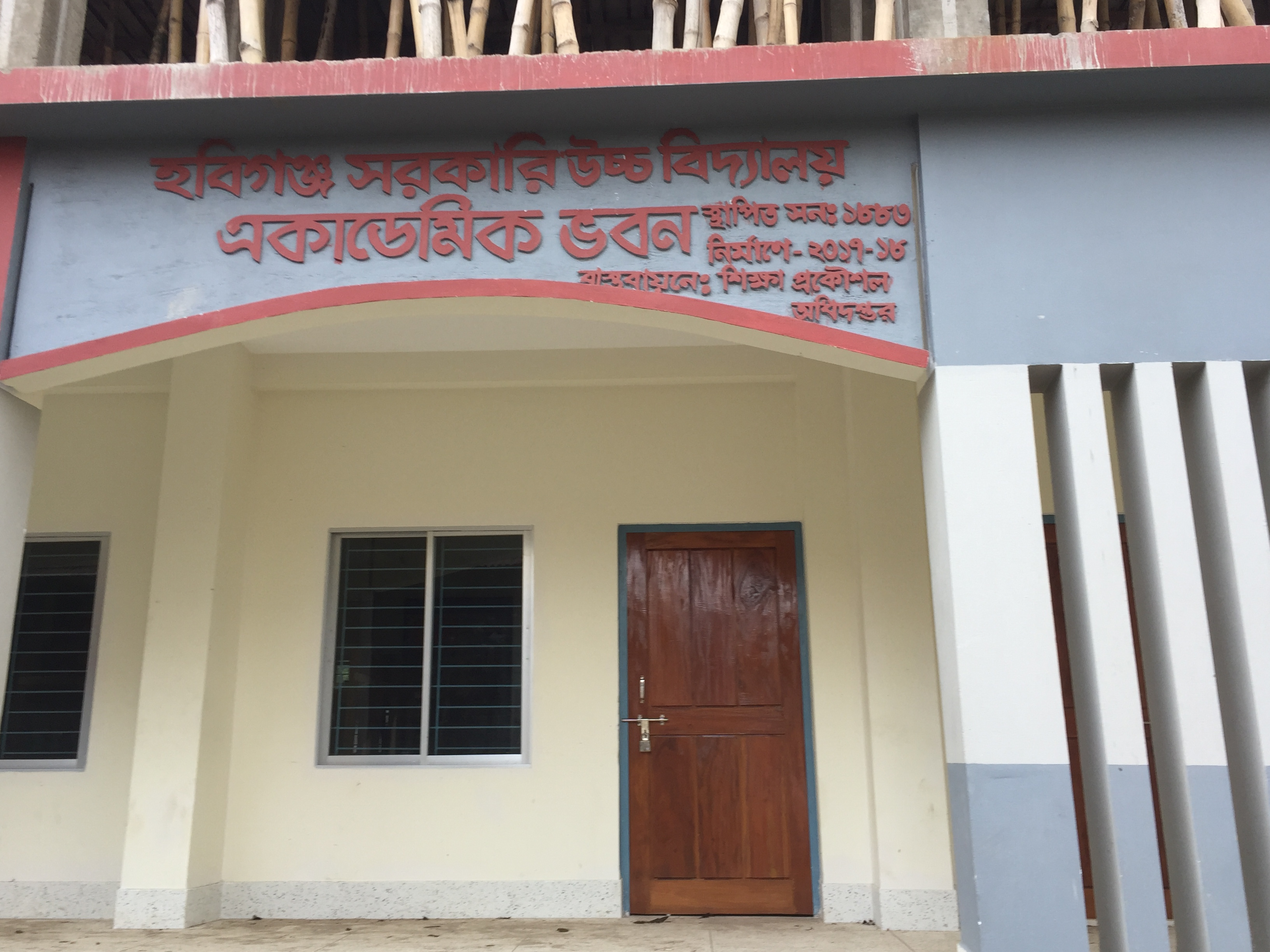 নির্মাণাধীন নতুন একাডেমিক ভবনের একাংশ